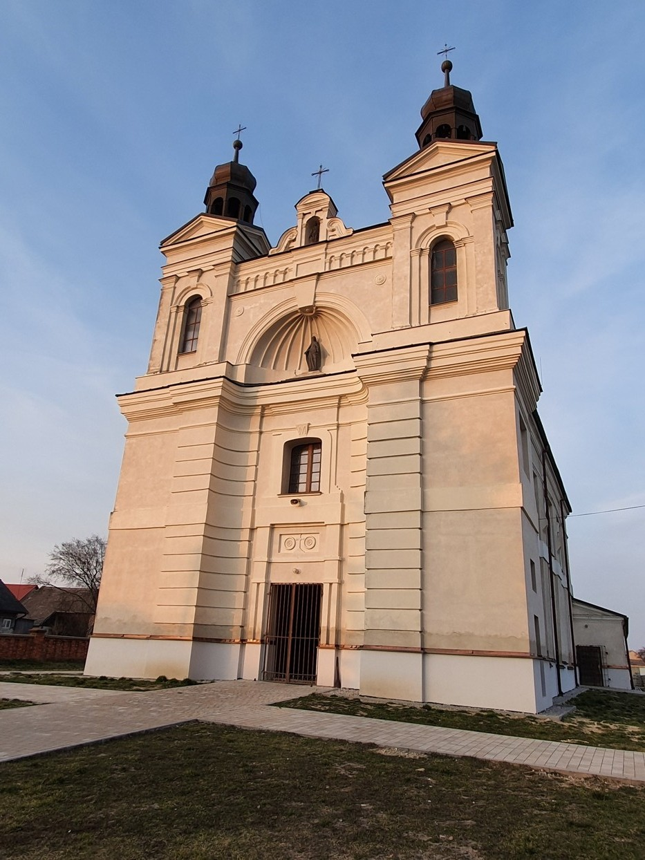 Kościół w Koniecznie